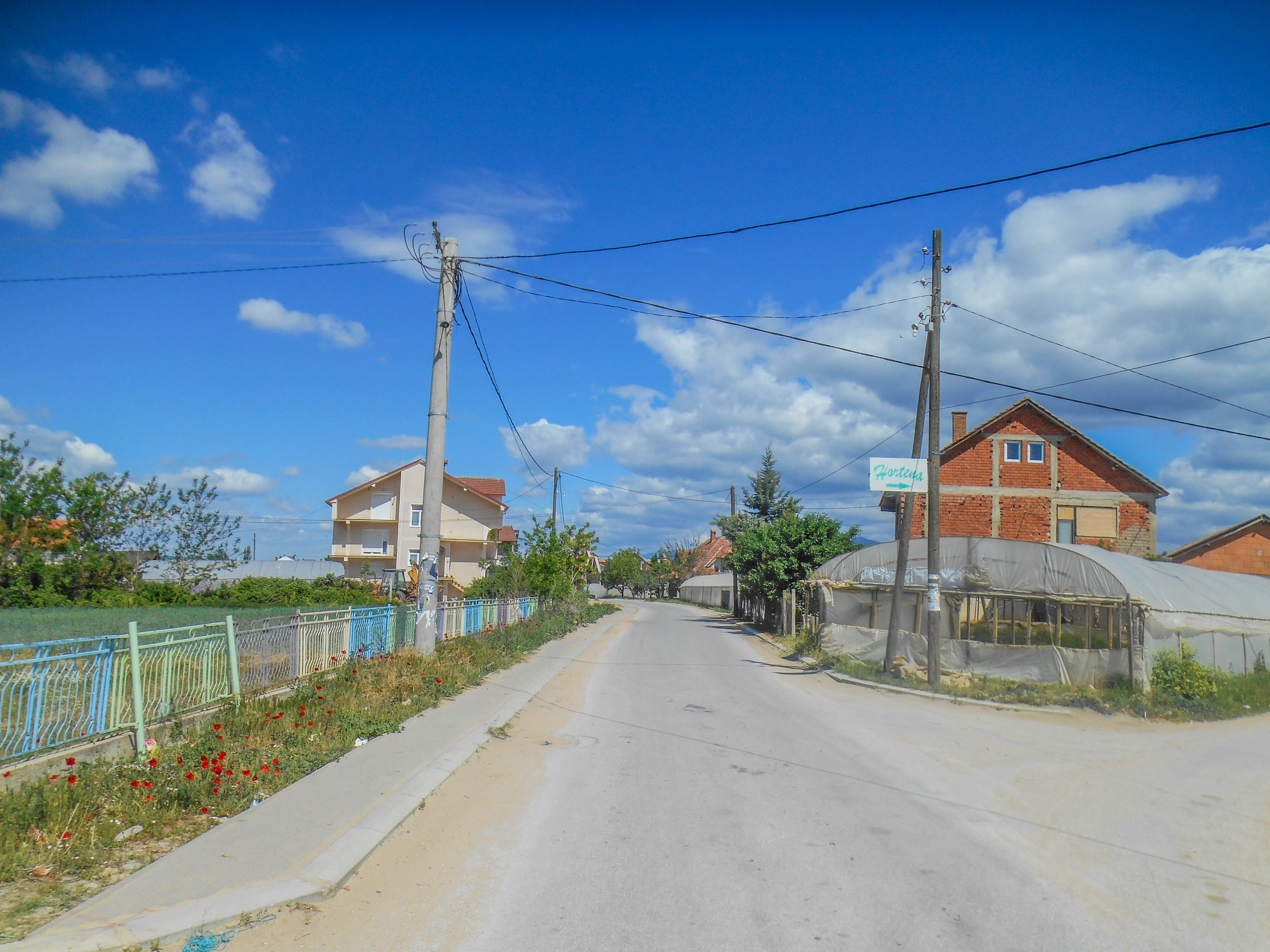 Пиперево